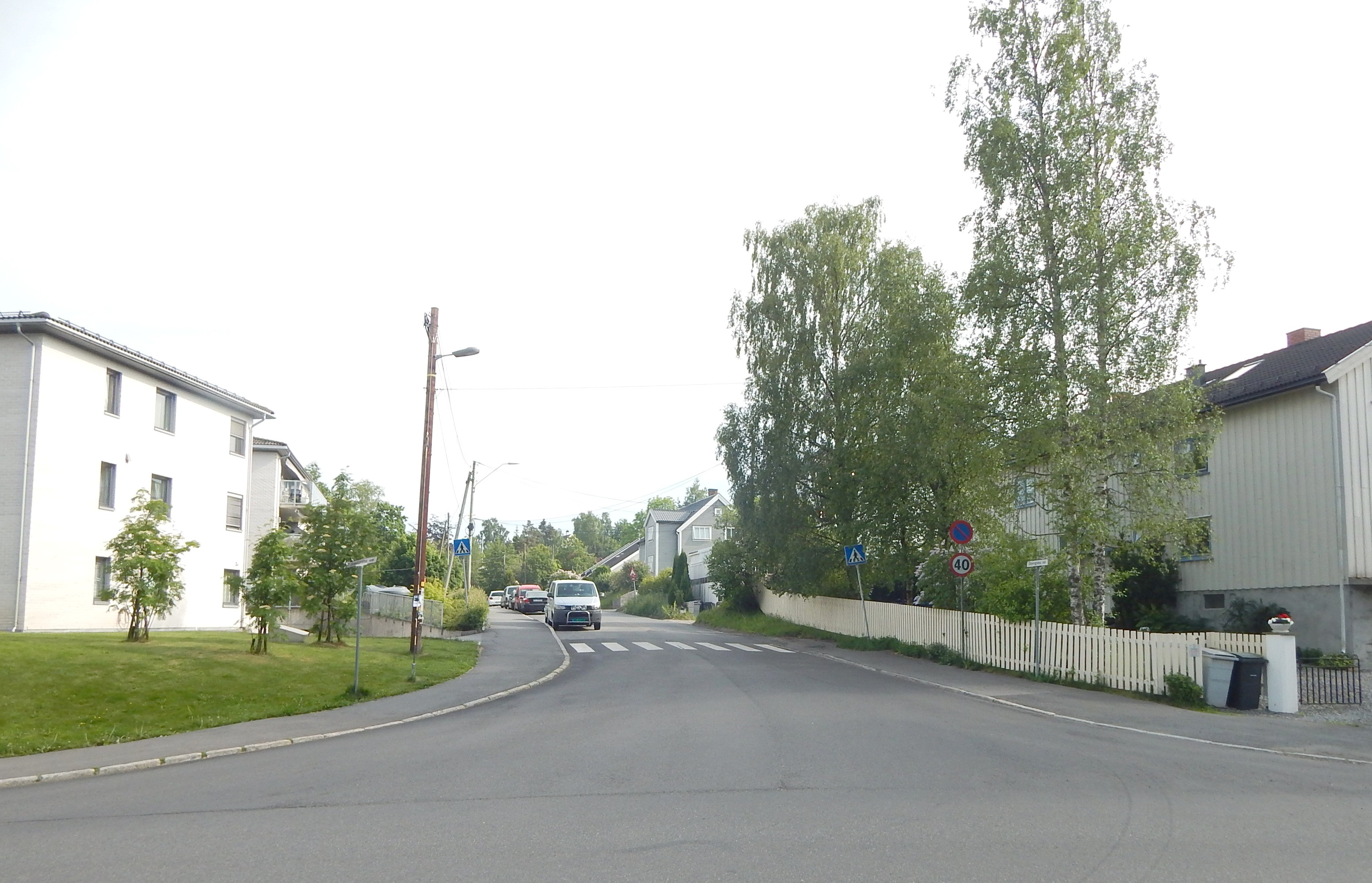 Dovresvingen sett fra Sandstuveien